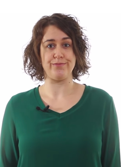 En este vídeo, nuestra diputada Teresa Arévalo nos habla sobre el veto del Gobierno de M.Rajoy a nuestra propuesta para crear un fondo estatal para garantizar la accesibilidad universal.